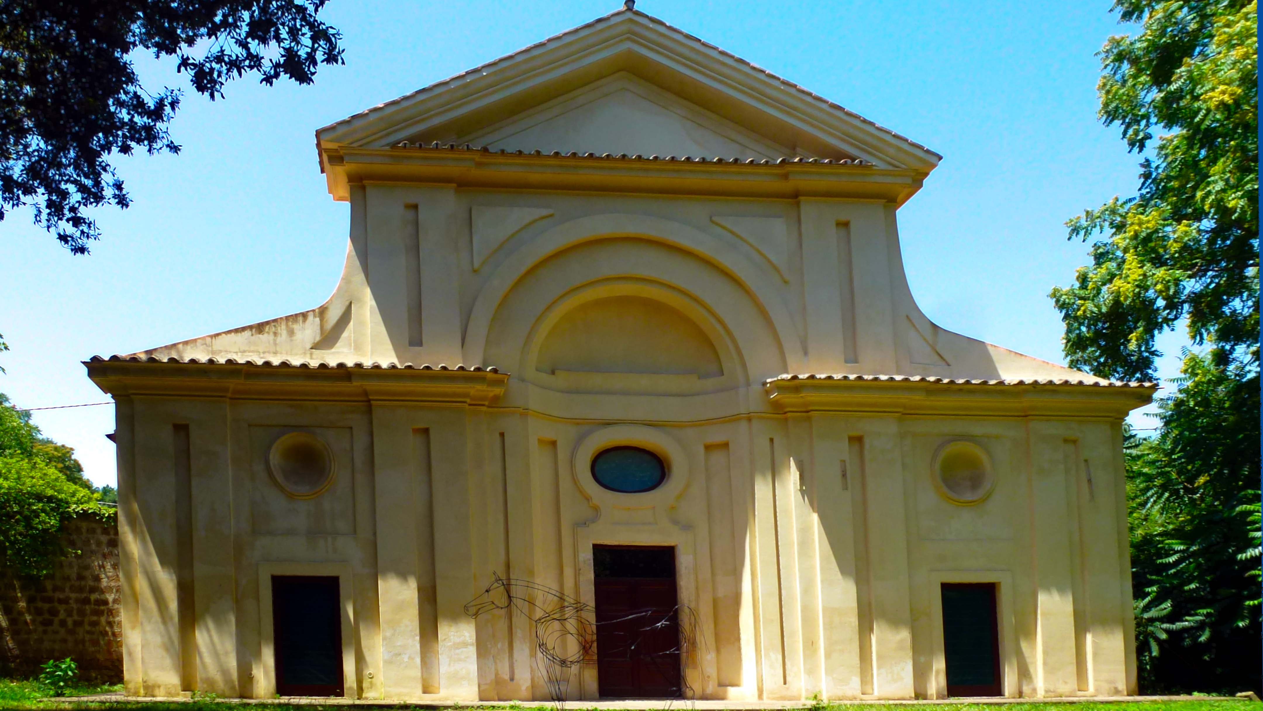 Casino di caccia della villa Altieri, XVII secolo